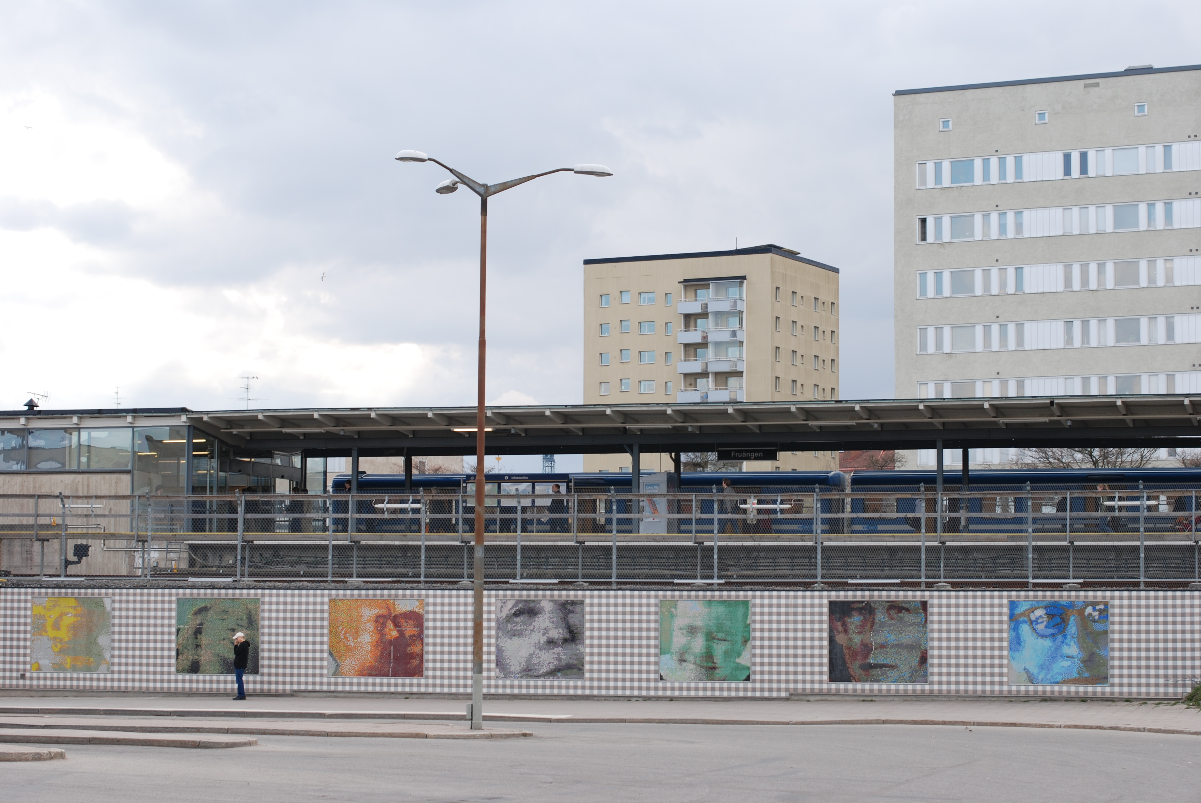 Fredrik Landergren´s Glass Mosaic Pictures outside Fruängen Metro Station, Stockholm, Sweden